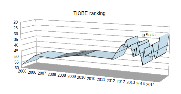 Ranking since 2006.